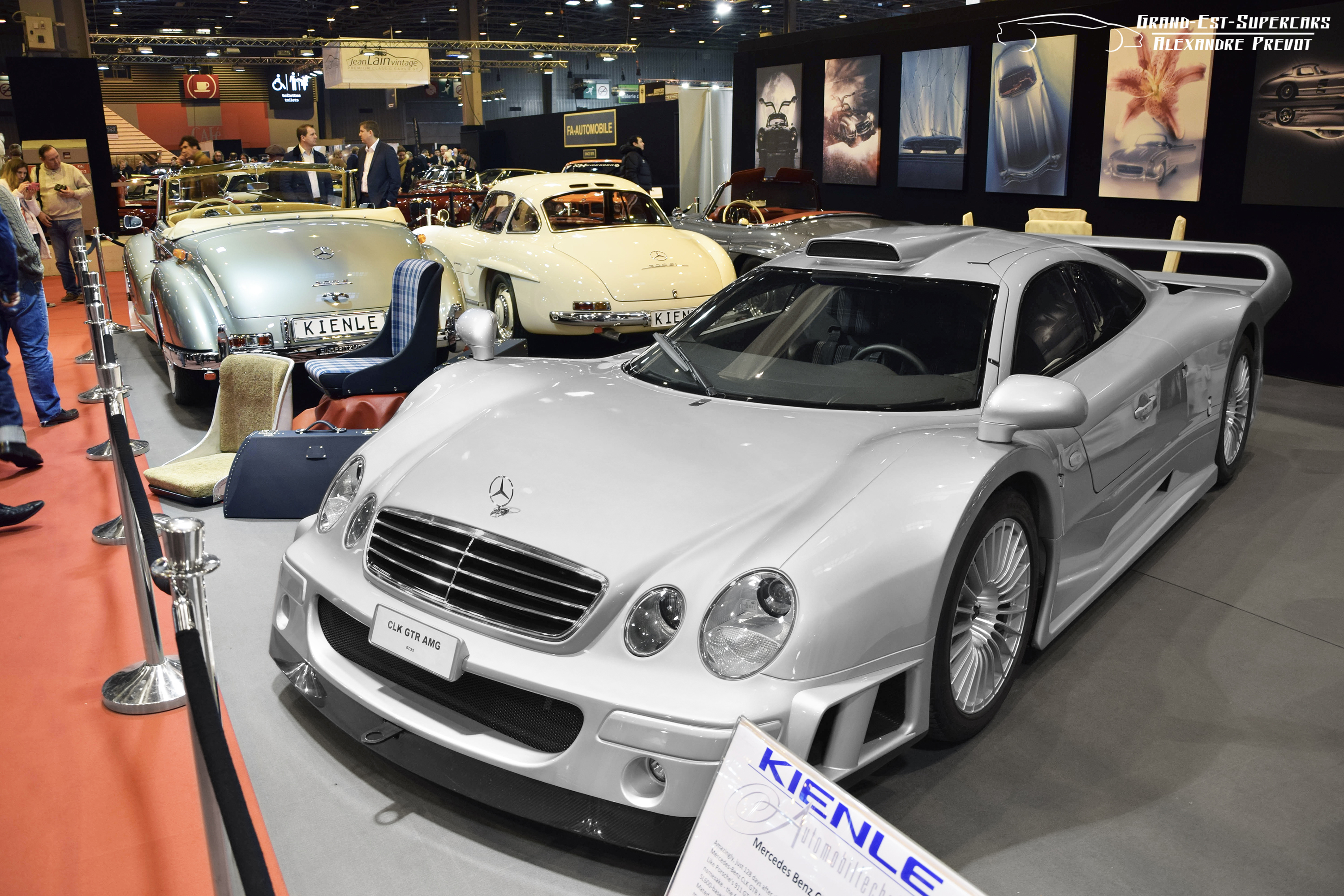 Production : n°07/25 exemplaires